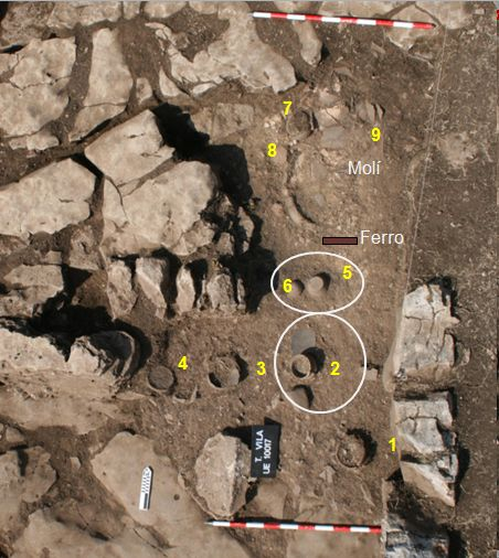 Vista de los diversos materiales localizados en la excavación de 2012